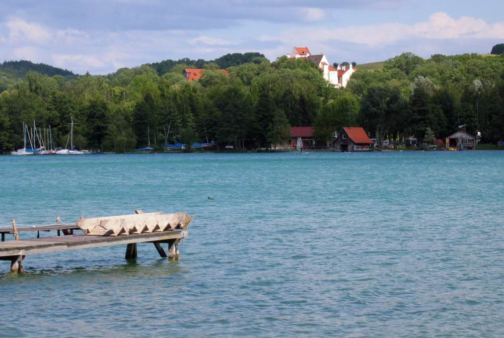 Blick auf den Pilsensee, Strandbad Hechendorf; im Hintergrund Schloß Seefeld. Von mir (Michael P. Geyer) aufgenommen.